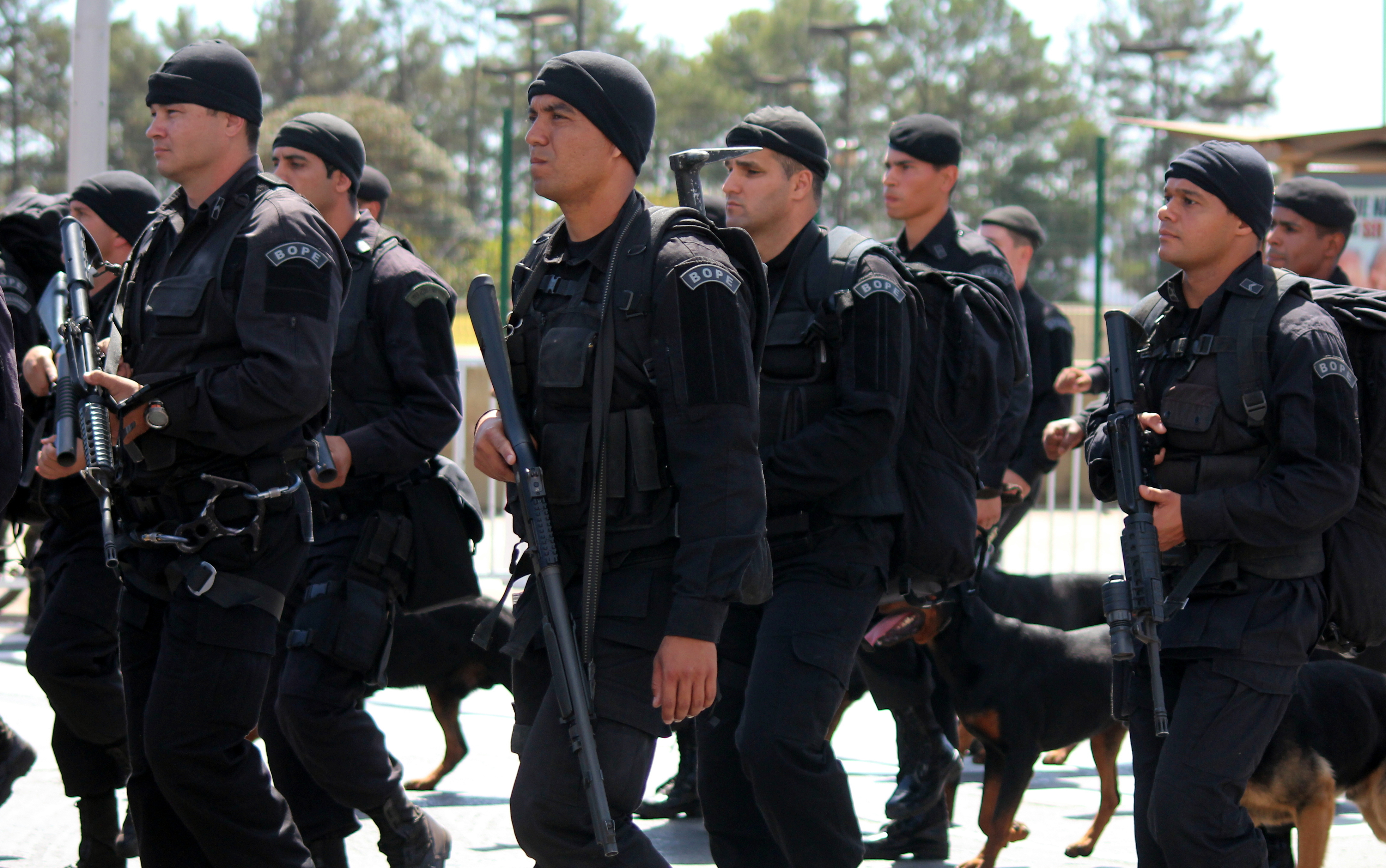 Batalhão de Operações Especiais Polícia Militar do Distrito Federal